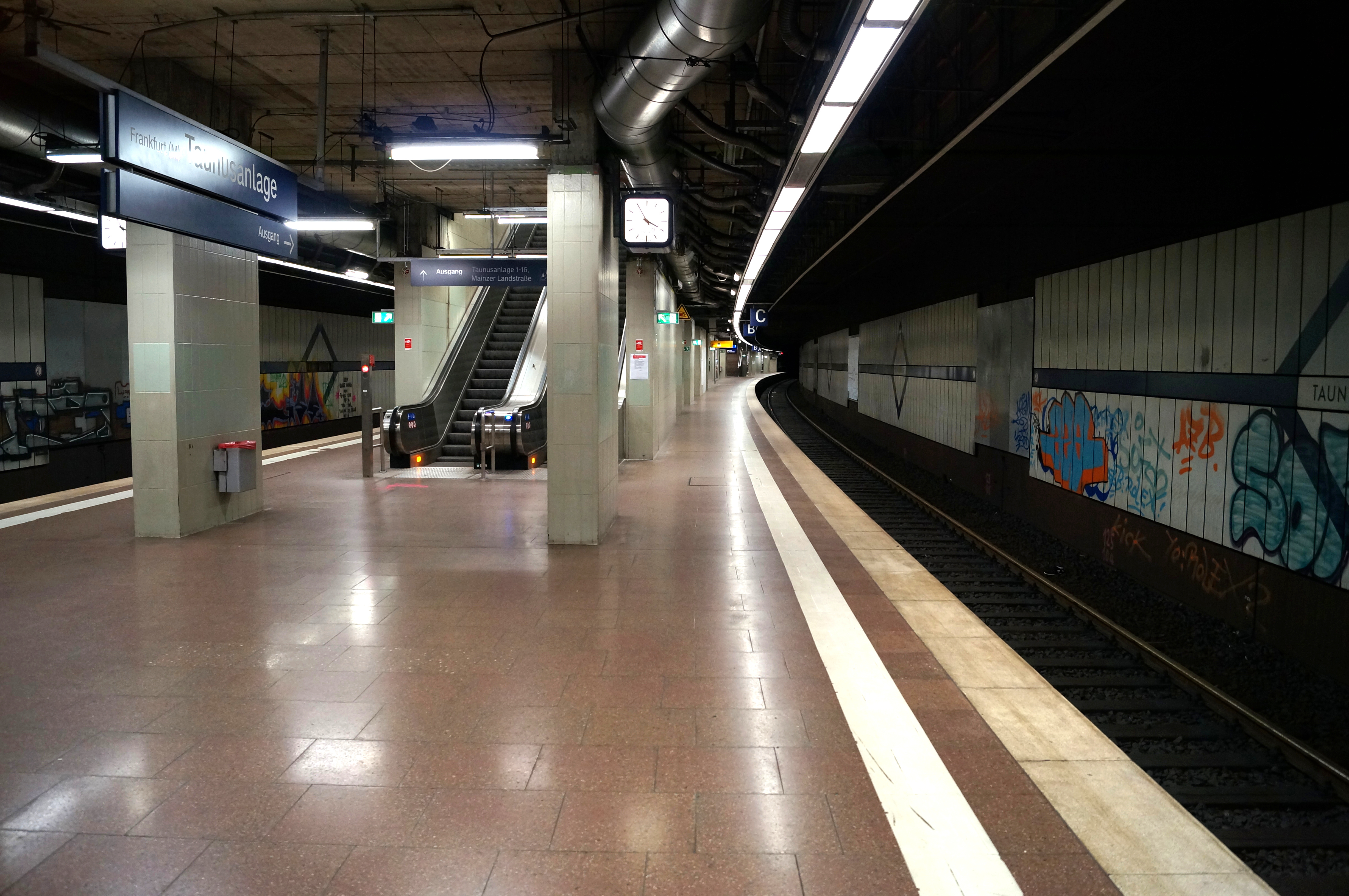 Die Bahnsteige des Bahnhofs Frankfurt (Main) Taunusanlage